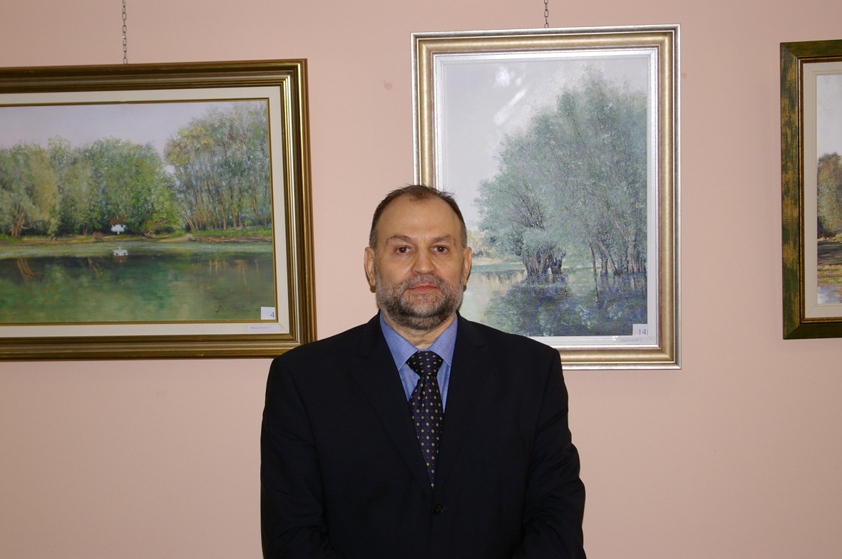 Dragan Petrovski, slikar